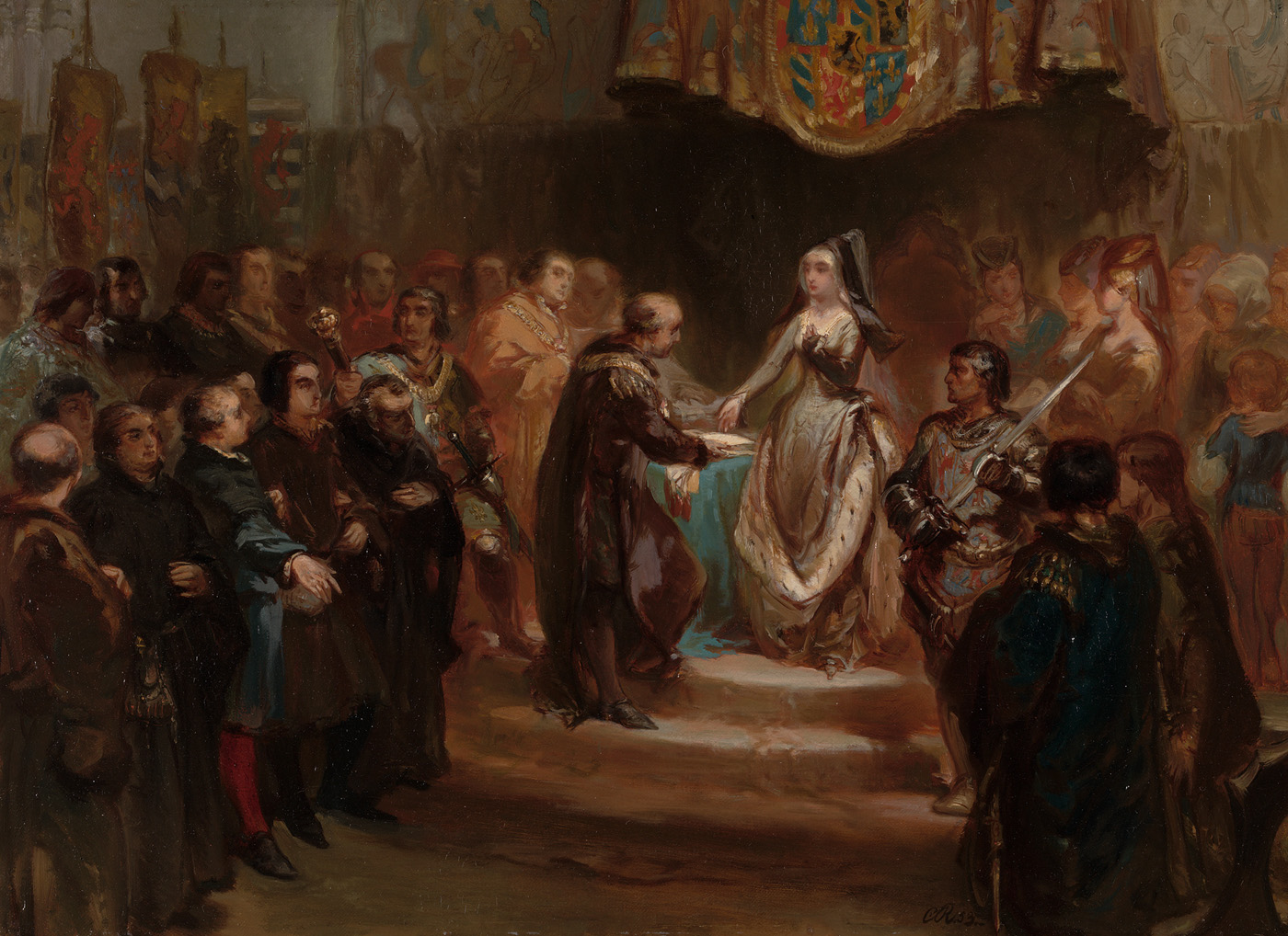 schilderij; Vos, Jacob de; geschiedenis (iconografie)